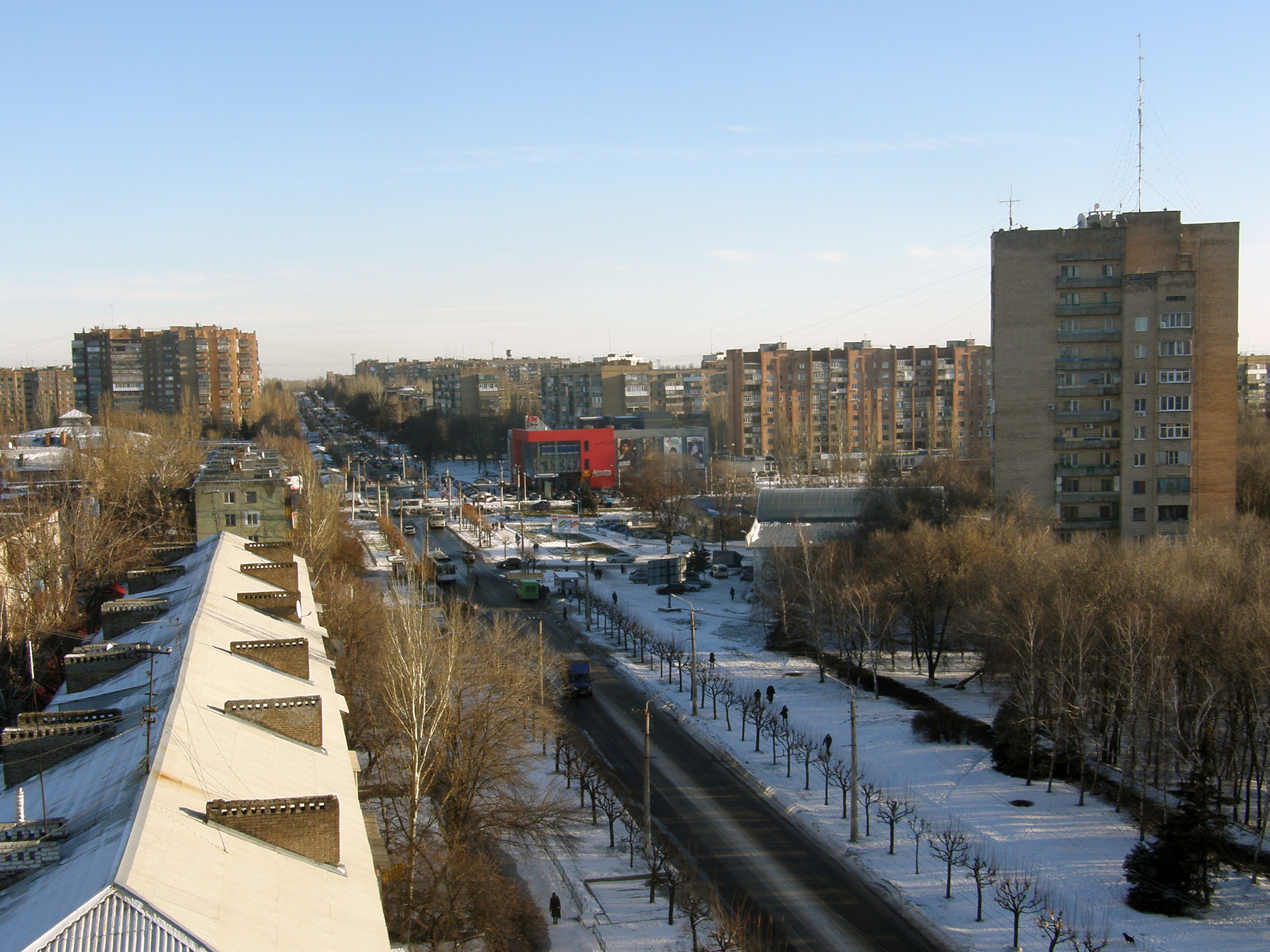 Краматорск